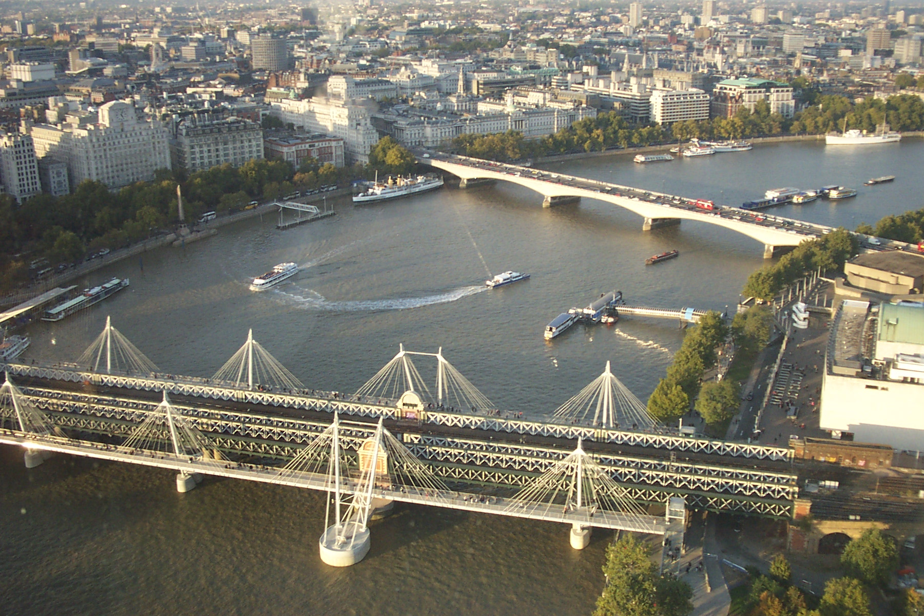 El río Támesis.